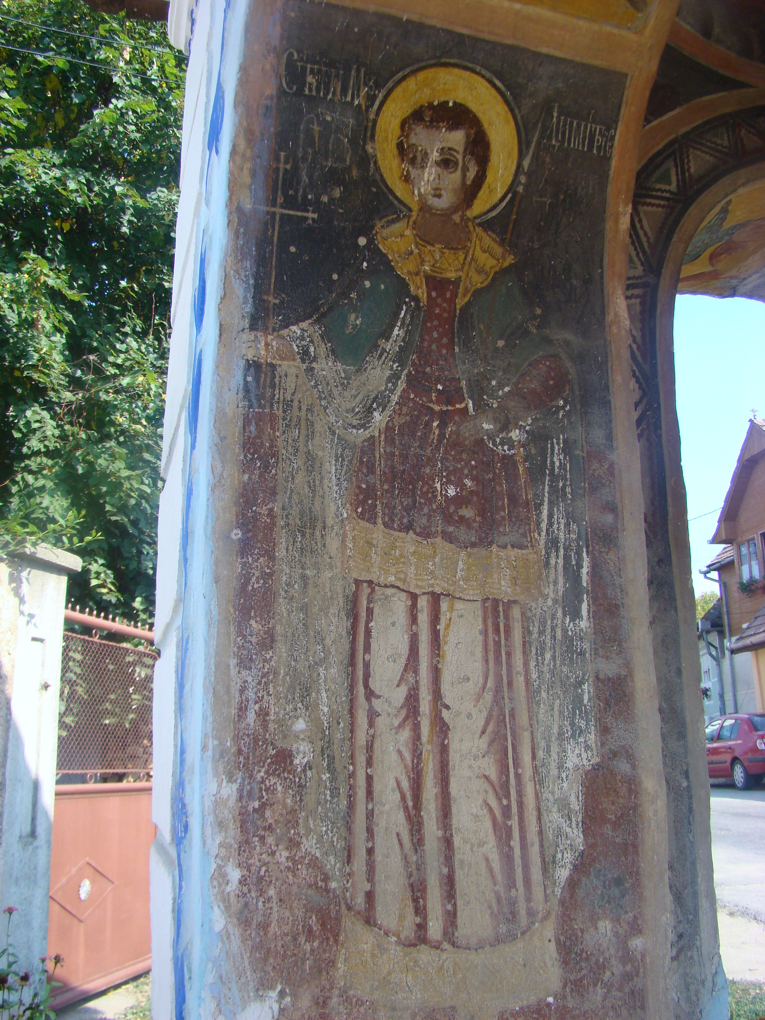 Troiță